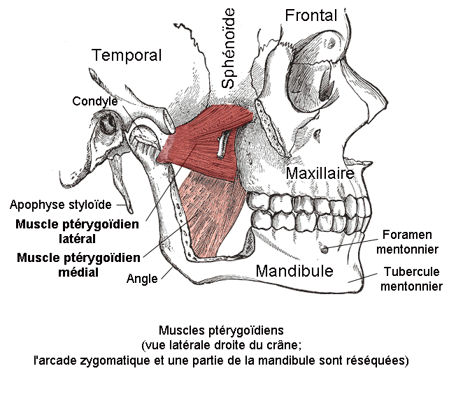 Muscle ptérygoïdien latéral. Anatomie humaine.